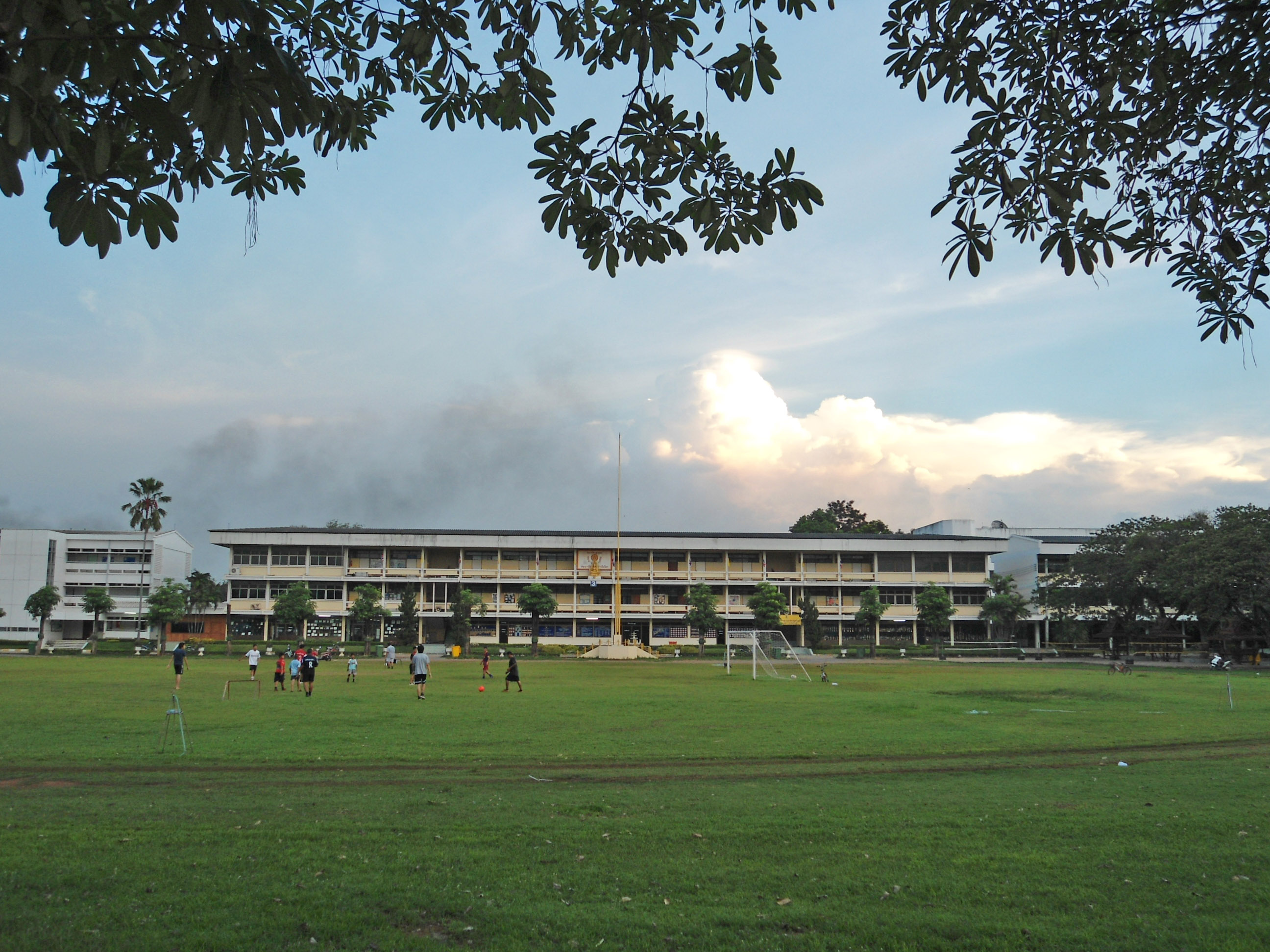 อาคาร 3 โรงเรียนอู่ทอง U Thong District school